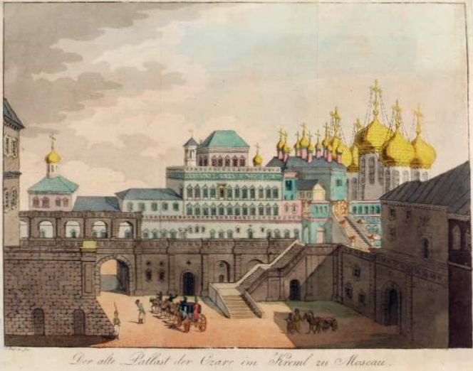 „Der alte Pallast der Czare im Kreml zu Moscau“, Aquatintatafel von G. Geissler, Frontispiz in: Georg Reinbeck: Flüchtige Bemerkungen auf einer Reise von St. Petersburg über Moskwa, Grodno, Warschau, Breslau nach Deutschland im Jahre 1805. In Briefen von G. Reinbeck, Band 1. Leipzig 1806